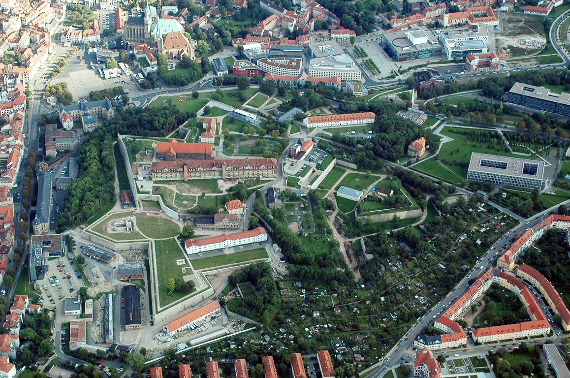 Luftbild aus Richtung Norden von der Zitadelle Petersberg in Erfurt